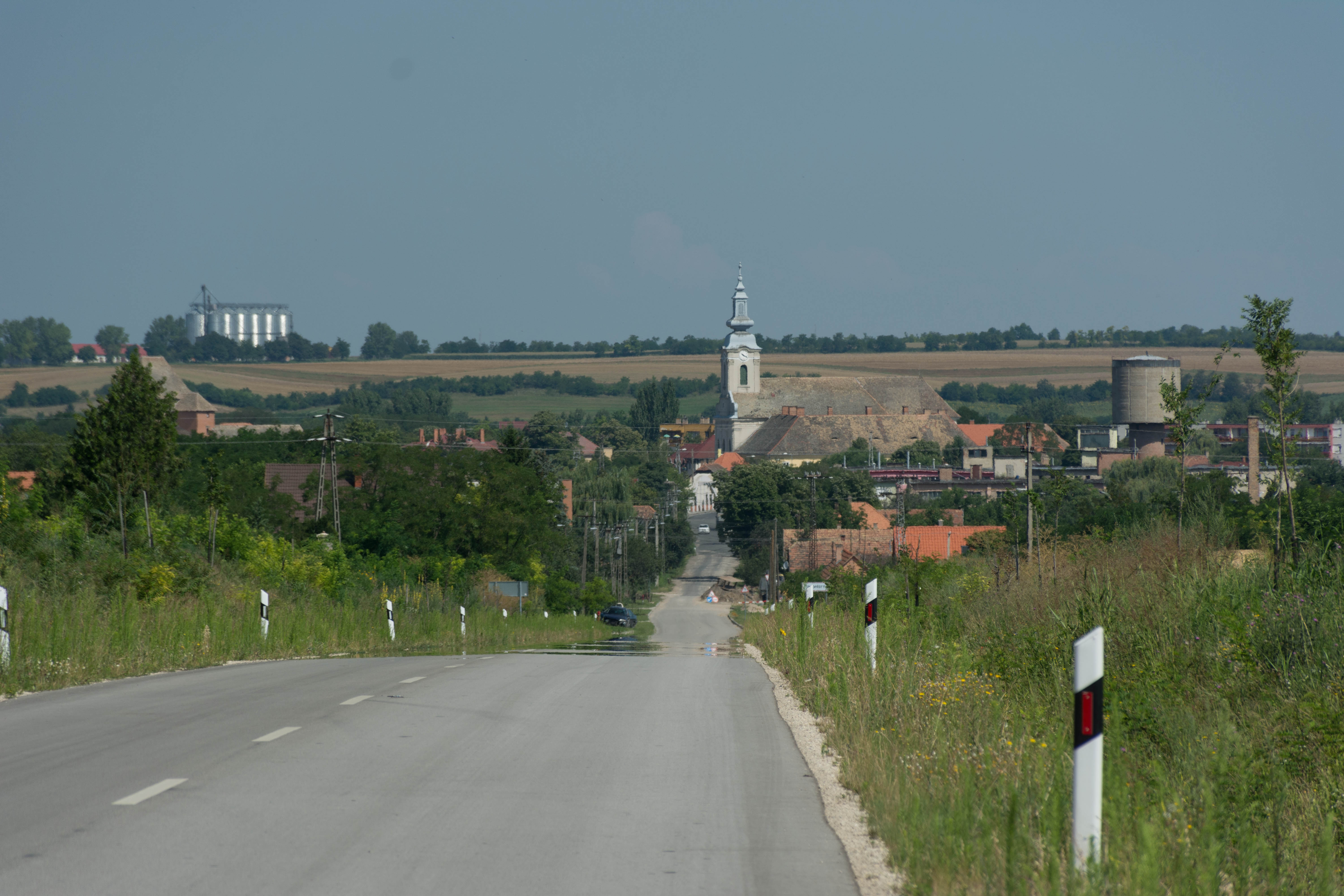 simontornya